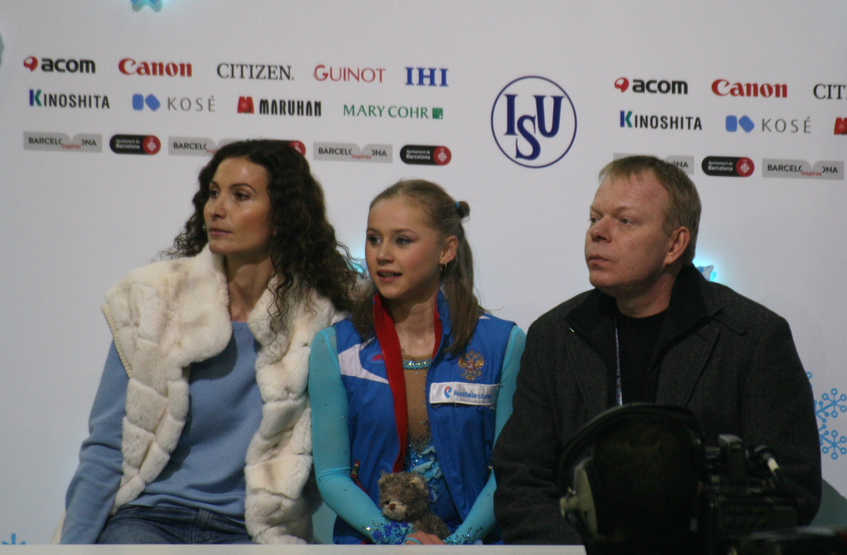 Серафима Саханович с тренерами Этери Тутберидзе и Сергеем Дудаковым на финале Гран-при среди юниоров сезона 2014-2015.